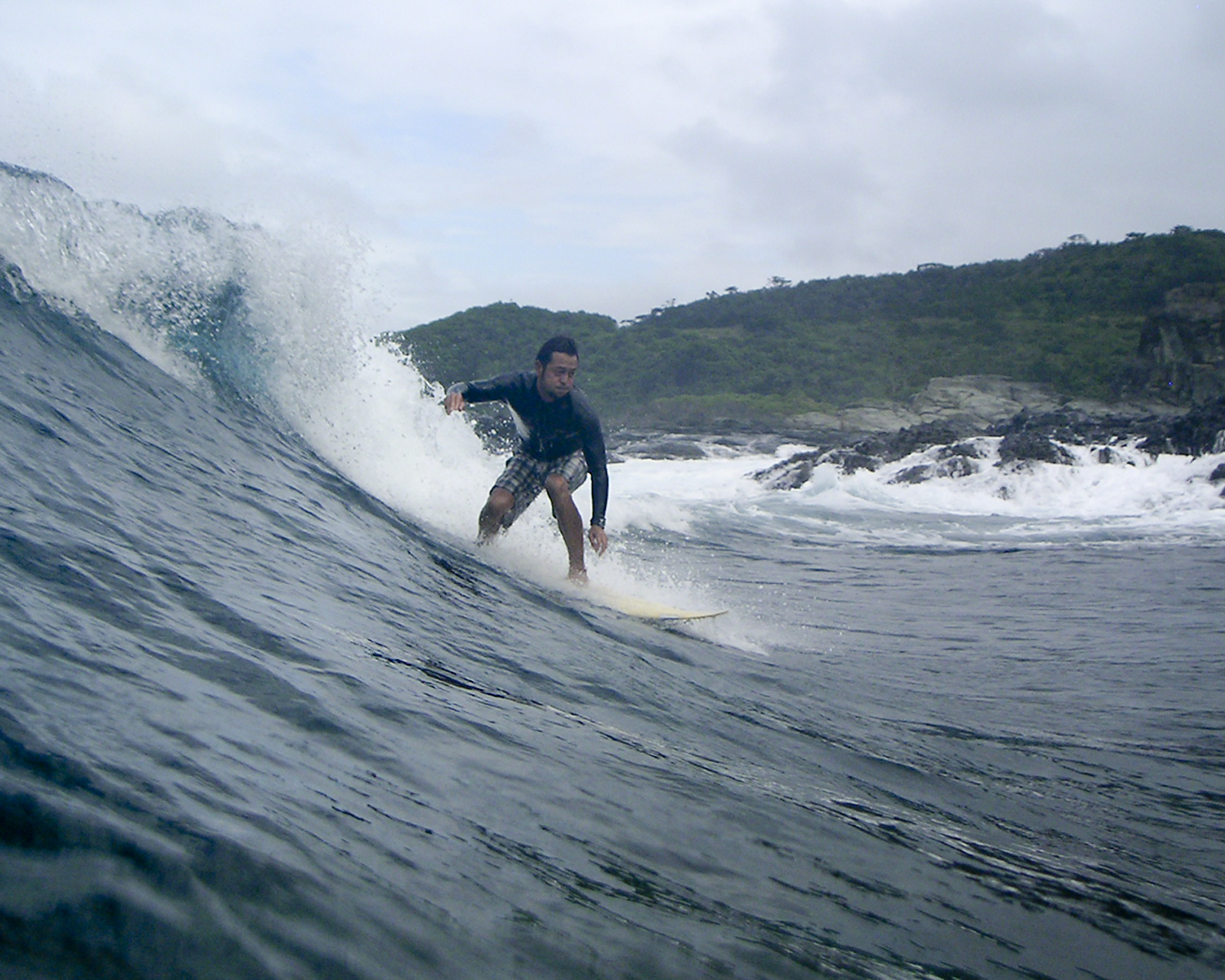 沖縄県・石垣島にて。